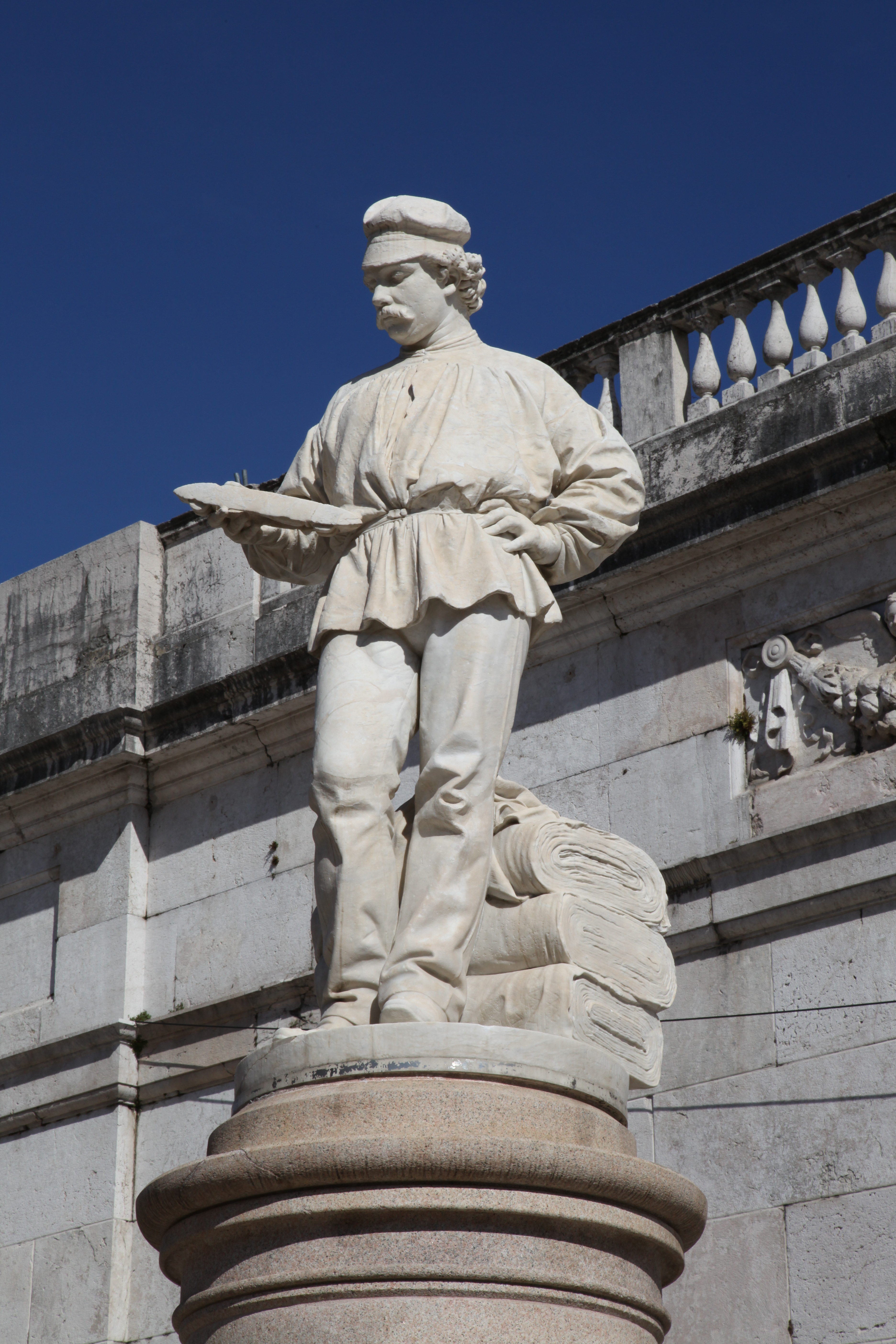 L'Omo - Monumento al Tessitore This is a photo of a monument which is part of cultural heritage of Italy.